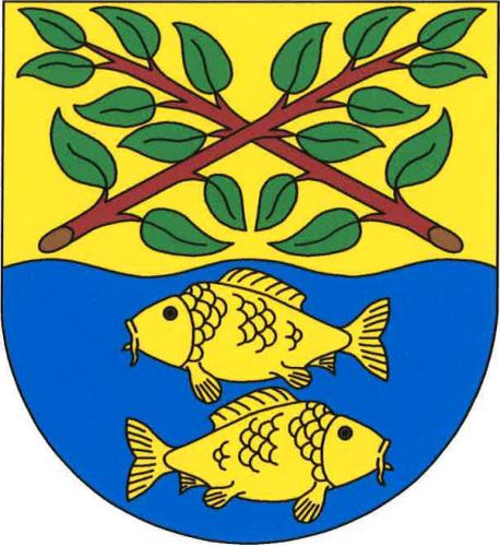 Rokytno, okres Pardubice, znak